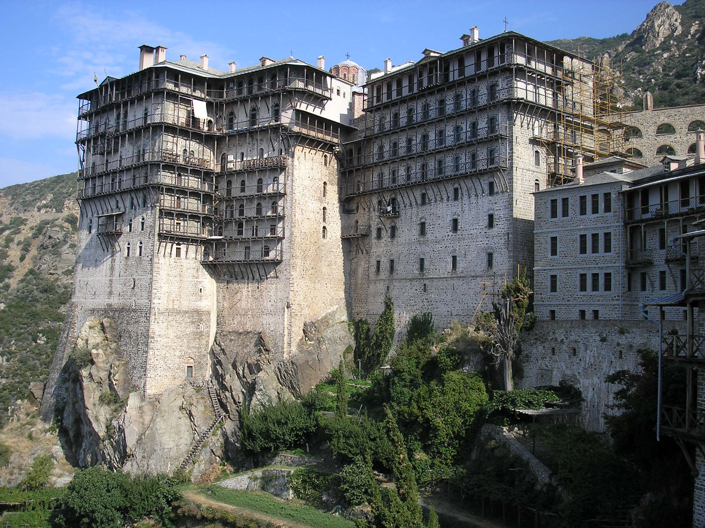 Simonopetra monastery in Mount Athos, Greece as seen from the south. Photo taken by Thodoris Lakiotis, August 2006. Posted under GFDL with his permission.